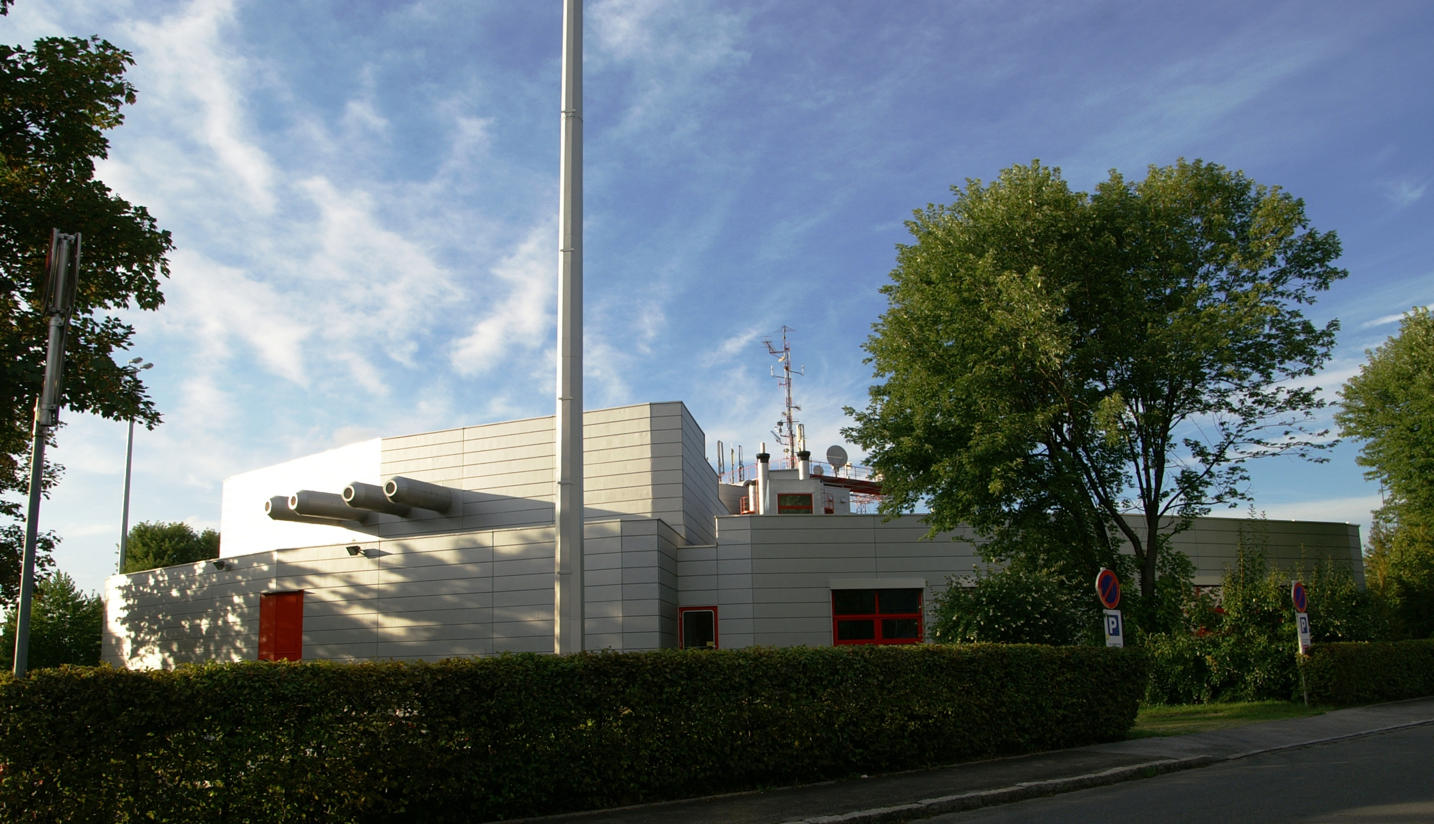 Österreichischer Rundfunk, ORF-Landesstudio Vorarlberg in Dornbirn. Ein Werk des Achitekten Gustav Peichl